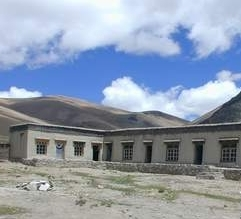 Schule in Zombuk